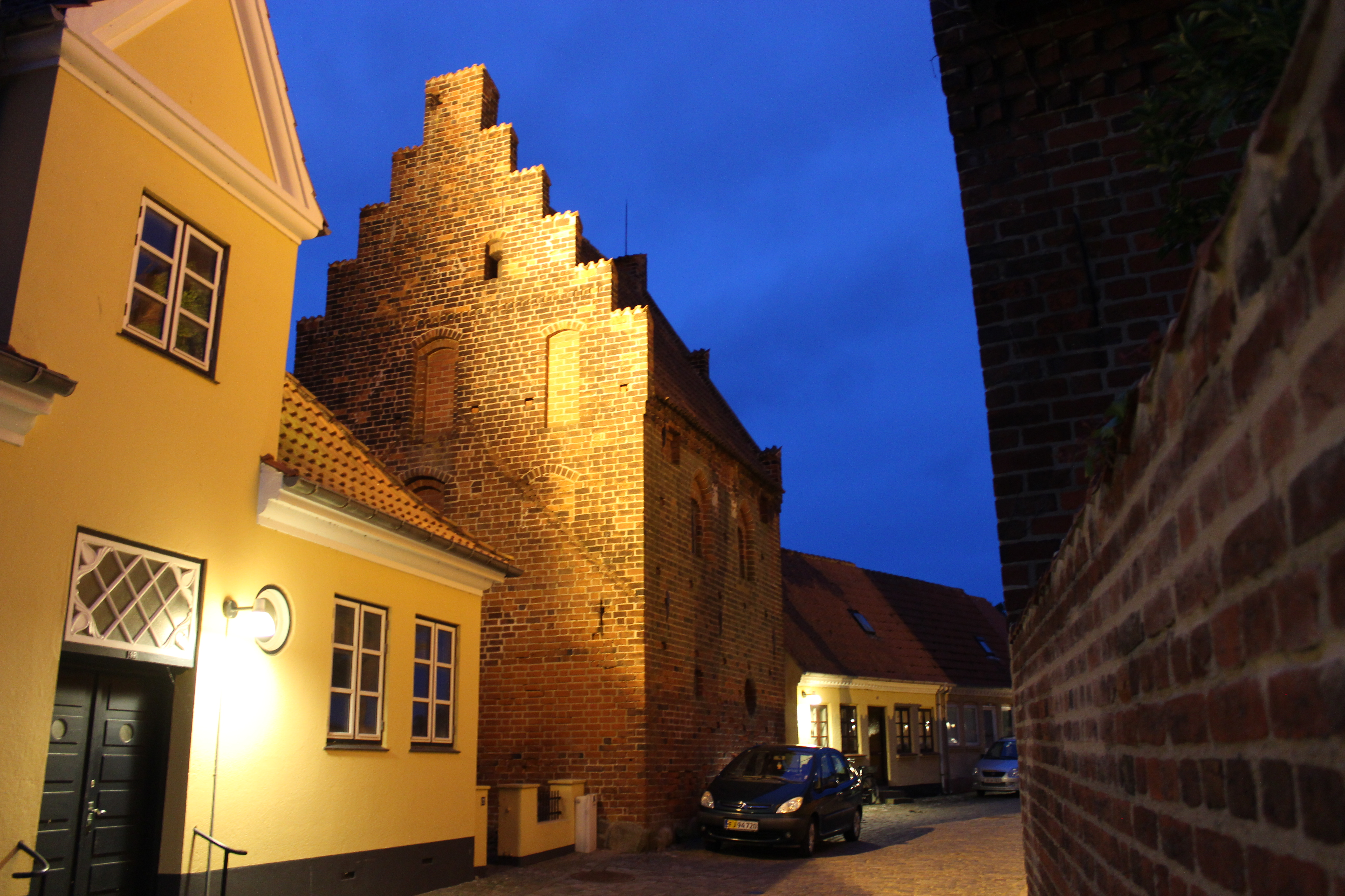 Set i juni 2017.